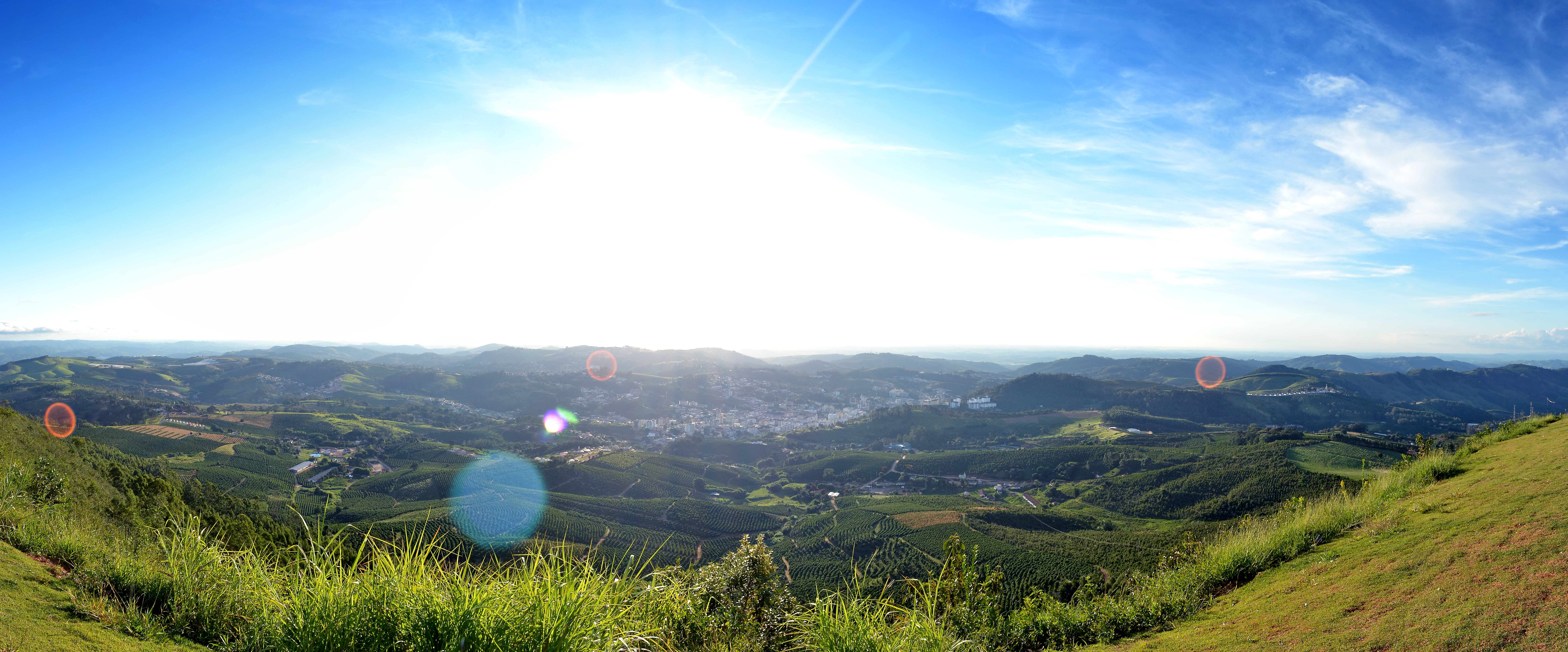 Vista panorâmica do "Alto do Morro", na cidade de Serra Negra, São Paulo